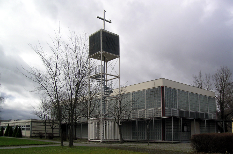 St. Olavs kirke, Trondheim. Bygd 1973. arkitekt: Per Kartvedt.